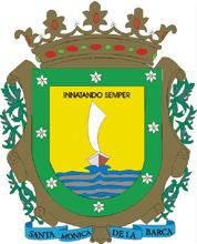 la barca escudo